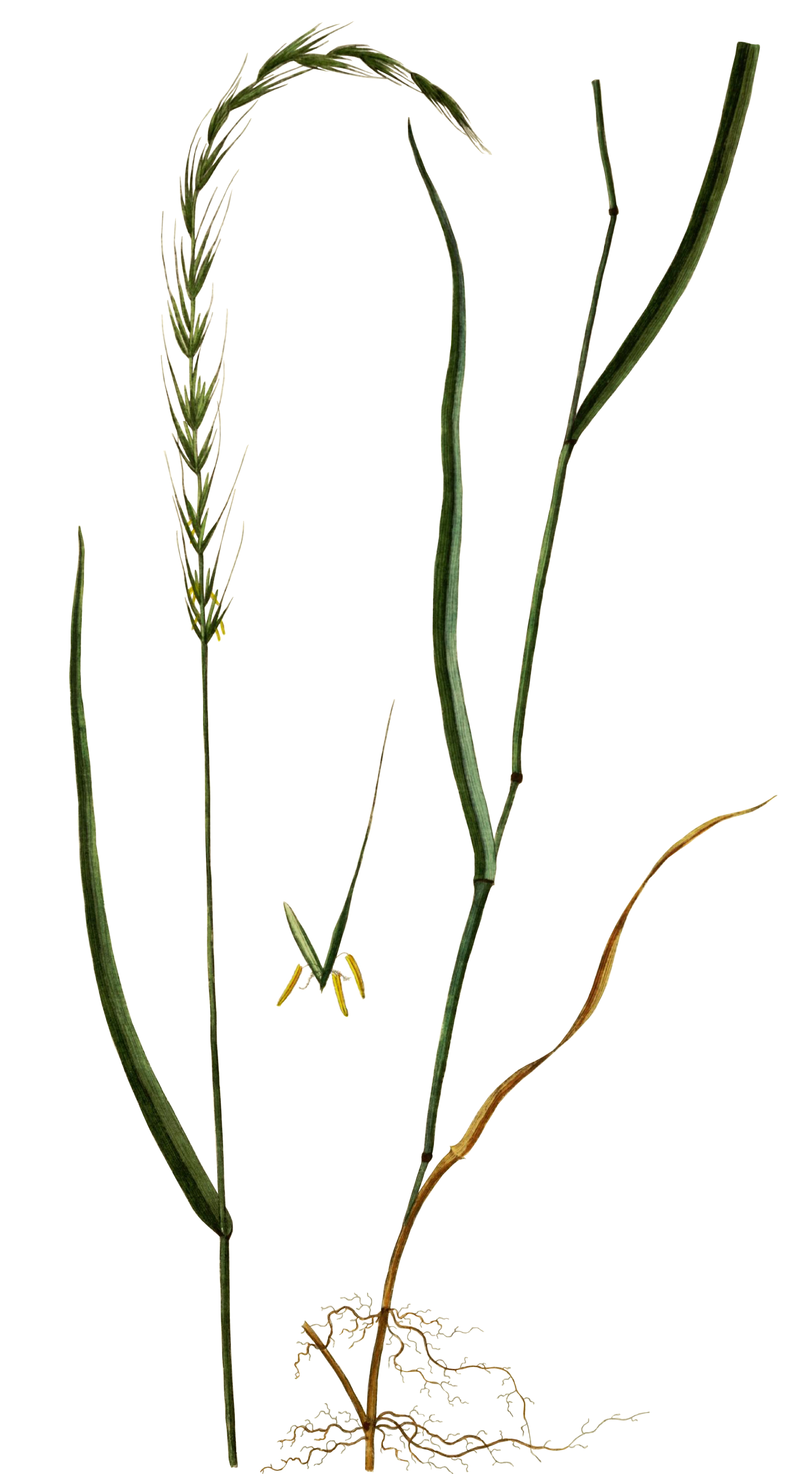 Elymus caninus (L.) L.